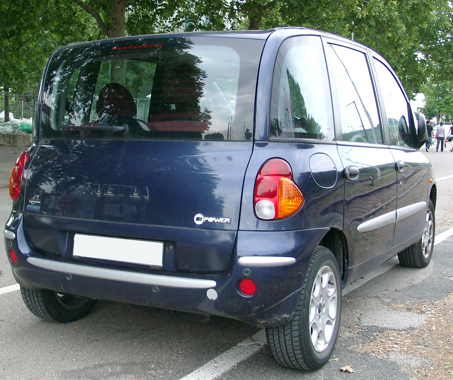 Fiat Multipla, 1. Generation